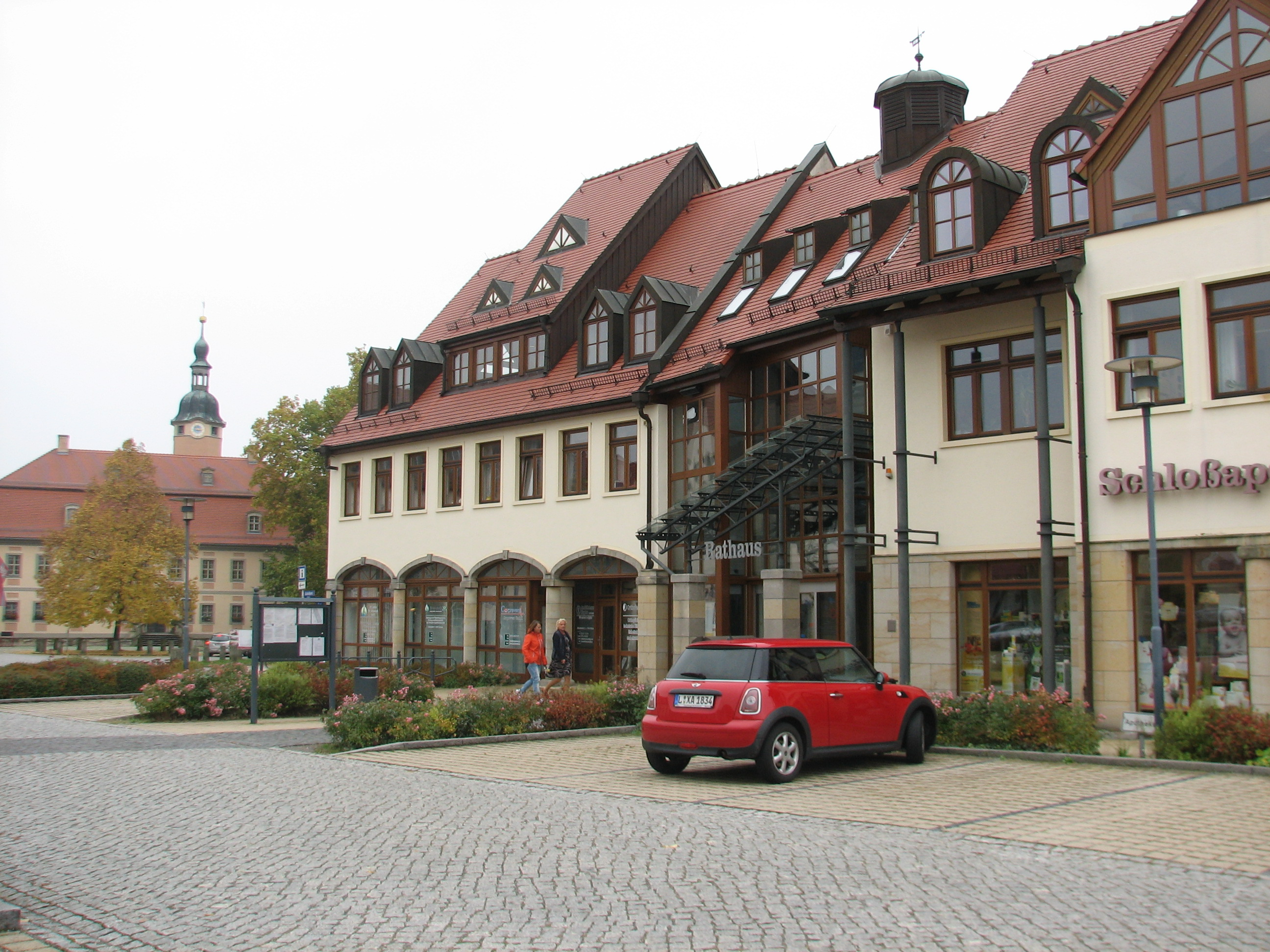 Das Rathaus am Markt in Machern, links im Hintergrund das Schloss